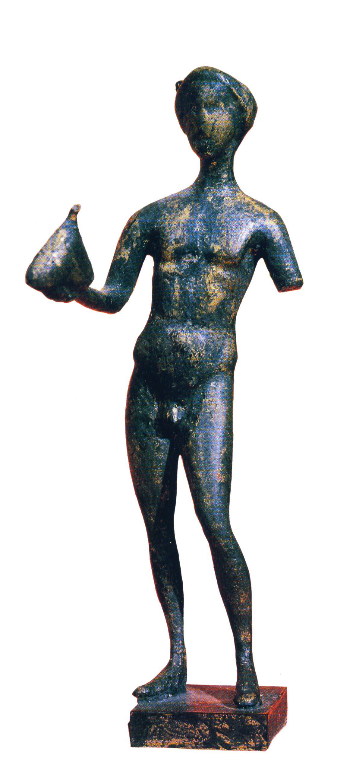 merkur scheibbs